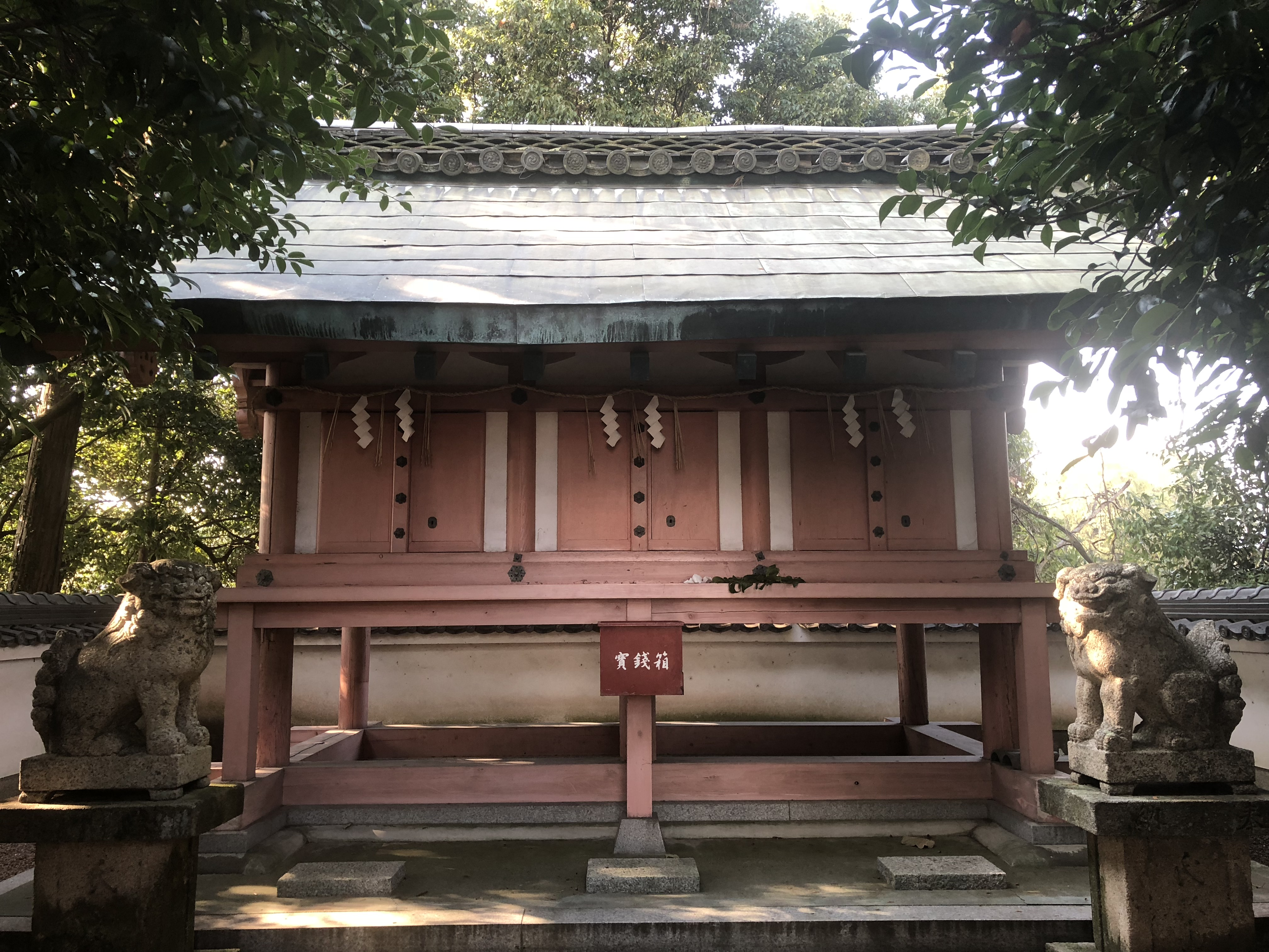 奈良市六条町 皆天満宮 本殿